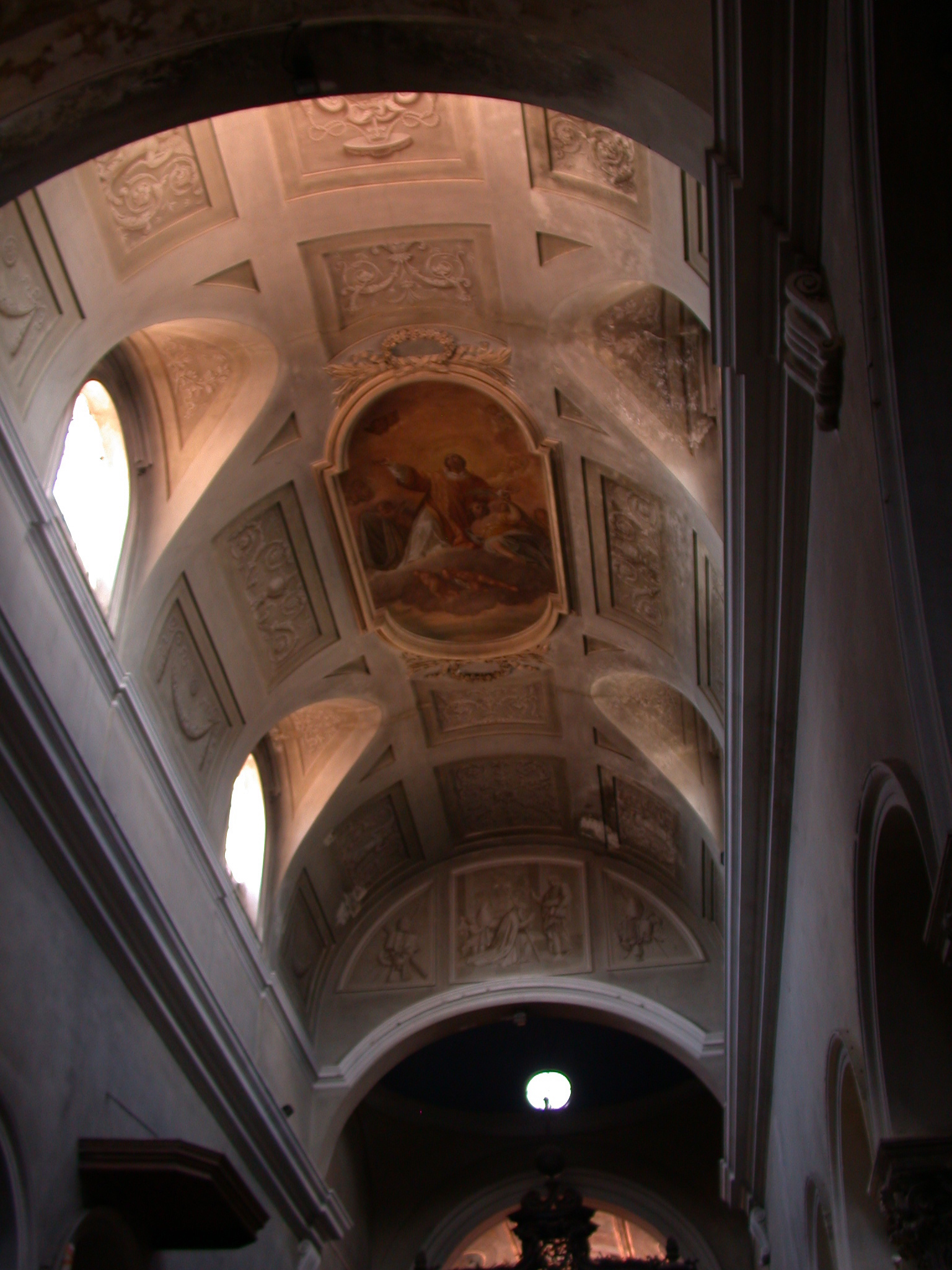 Terracina (provincia di Latina, Lazio, Italia), città alta, Duomo di San Cesareo, interno, volta affrescata.